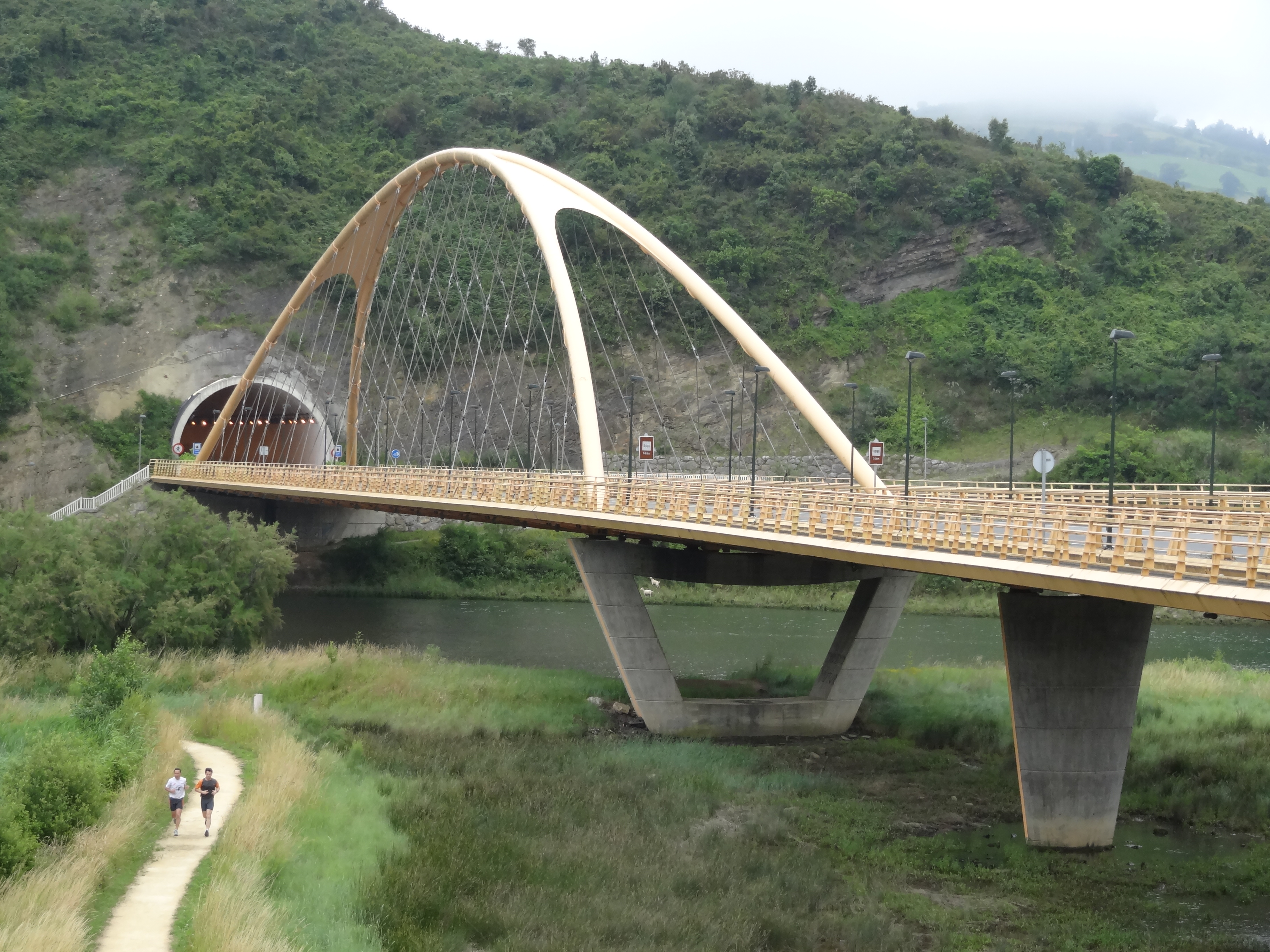 Bridge near Deba